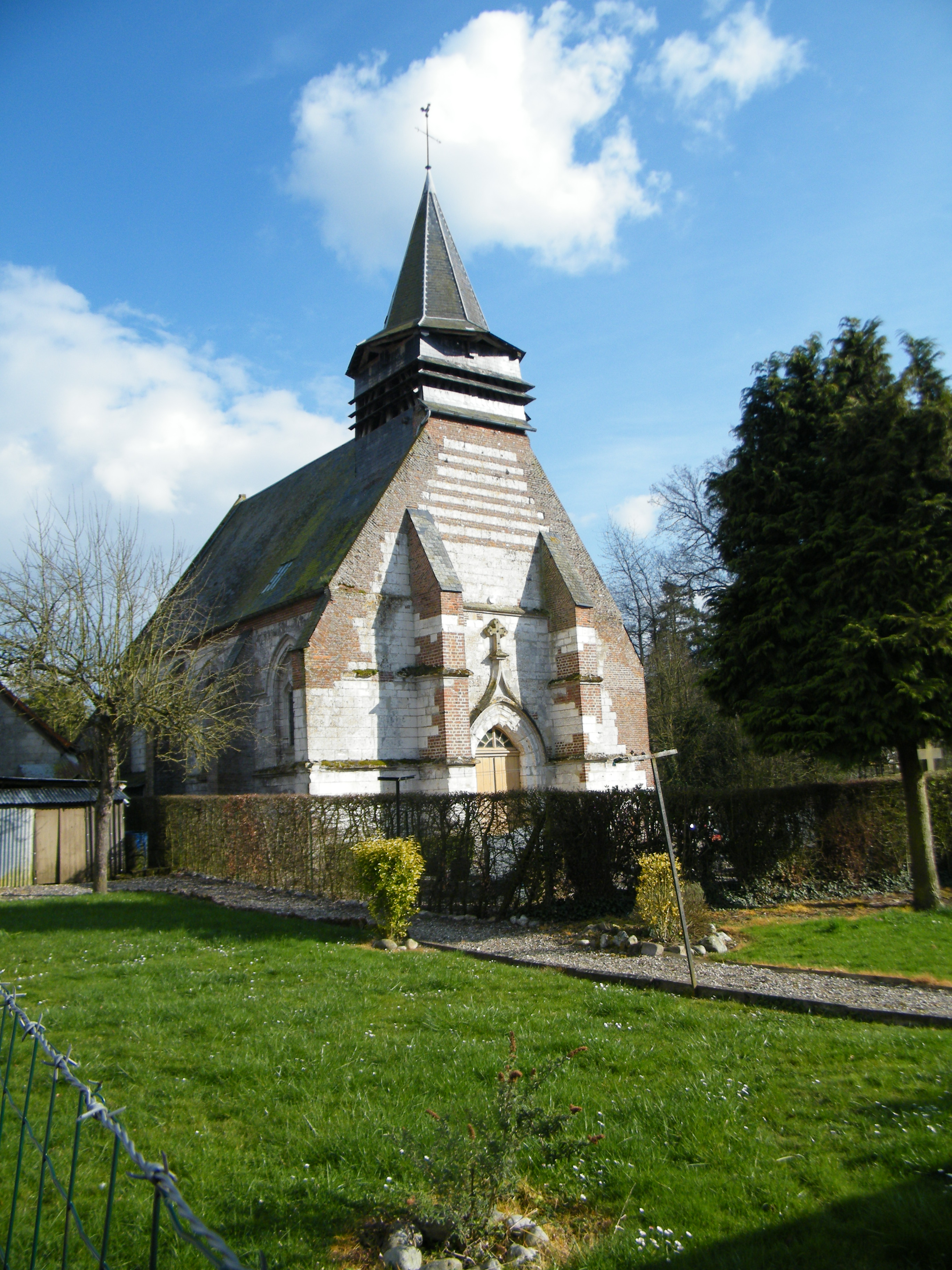 Le clocher, église Saint-Martin de Biencourt, Somme, France.